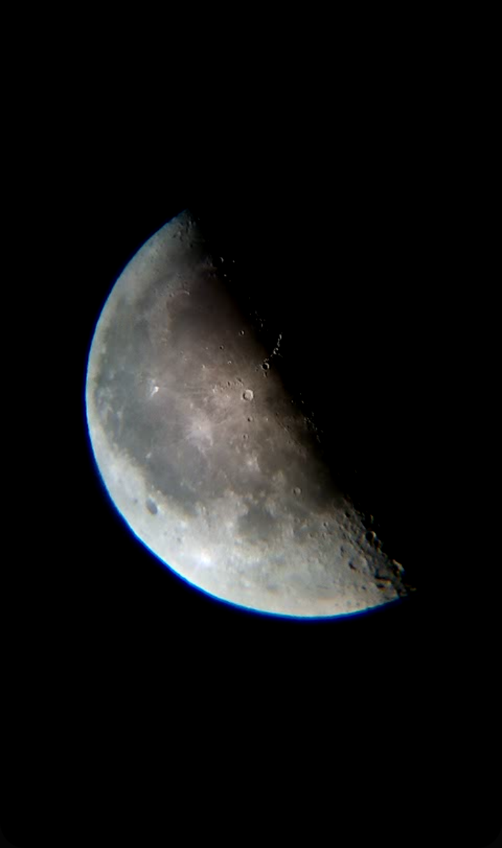 Cuarto menguante visto desde el hemisferio norte.